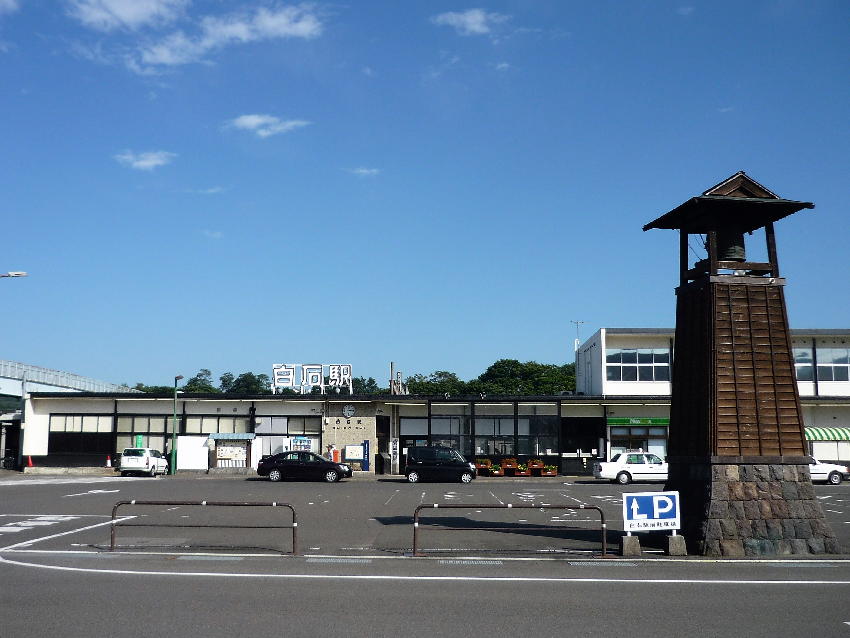 東北本線・白石駅駅舎 Panasonic Lumix DMC-FS3